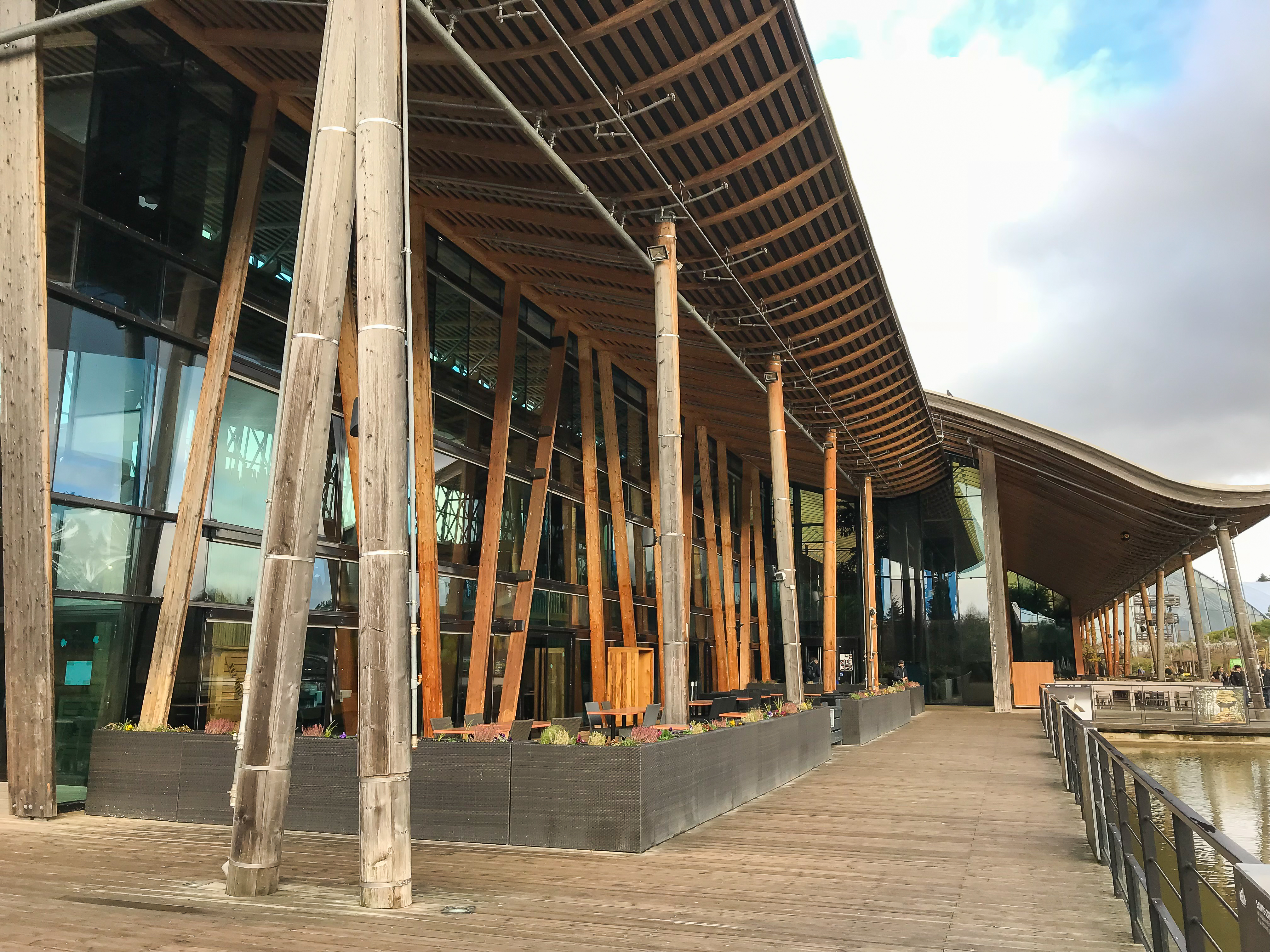 Vue de l'extérieur du "Dome" (réception, restaurants, boutiques, bowling, office de tourisme) du domaine "Les Trois Forêts" de Center Parcs